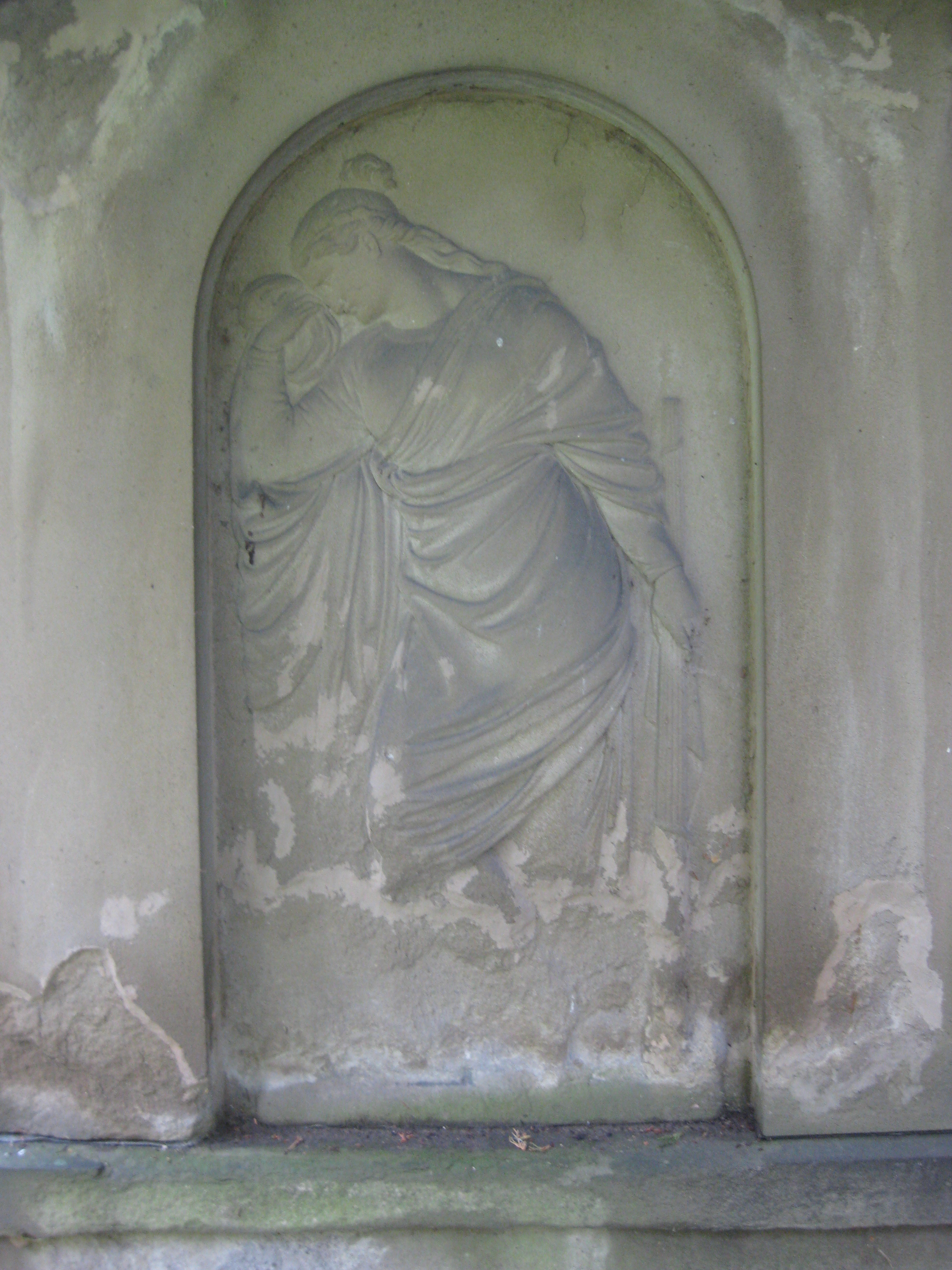 Ludwig Mack: Weibliche Figur mit umgekehrter Fackel (1830), Flachrelief in Sandstein, Foto 2010, Stuttgart, Hoppenlaufriedhof, Grabmal von Obertribunalrat Härlin genannt Tritschler (1749-1830), Inschriften nicht mehr erkennbar.)